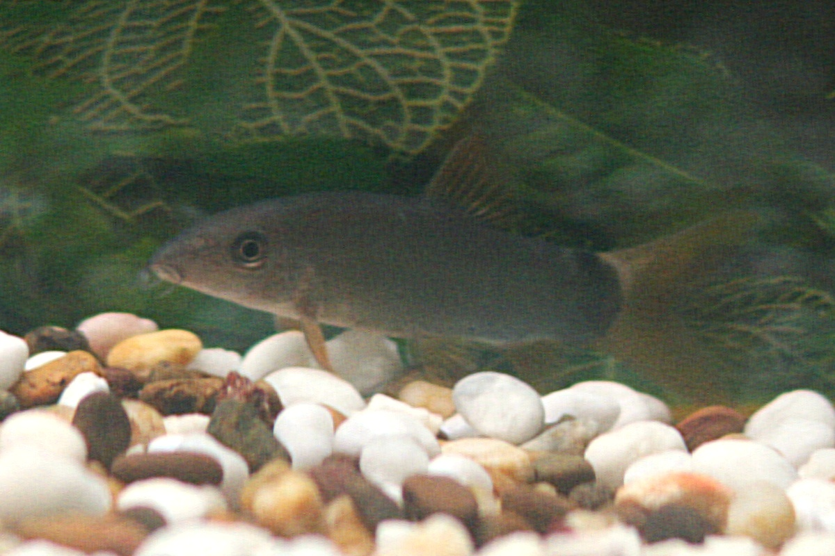 Yasuhikotakia modesta (or Botia rubripinnis). Size about 5cm SL.